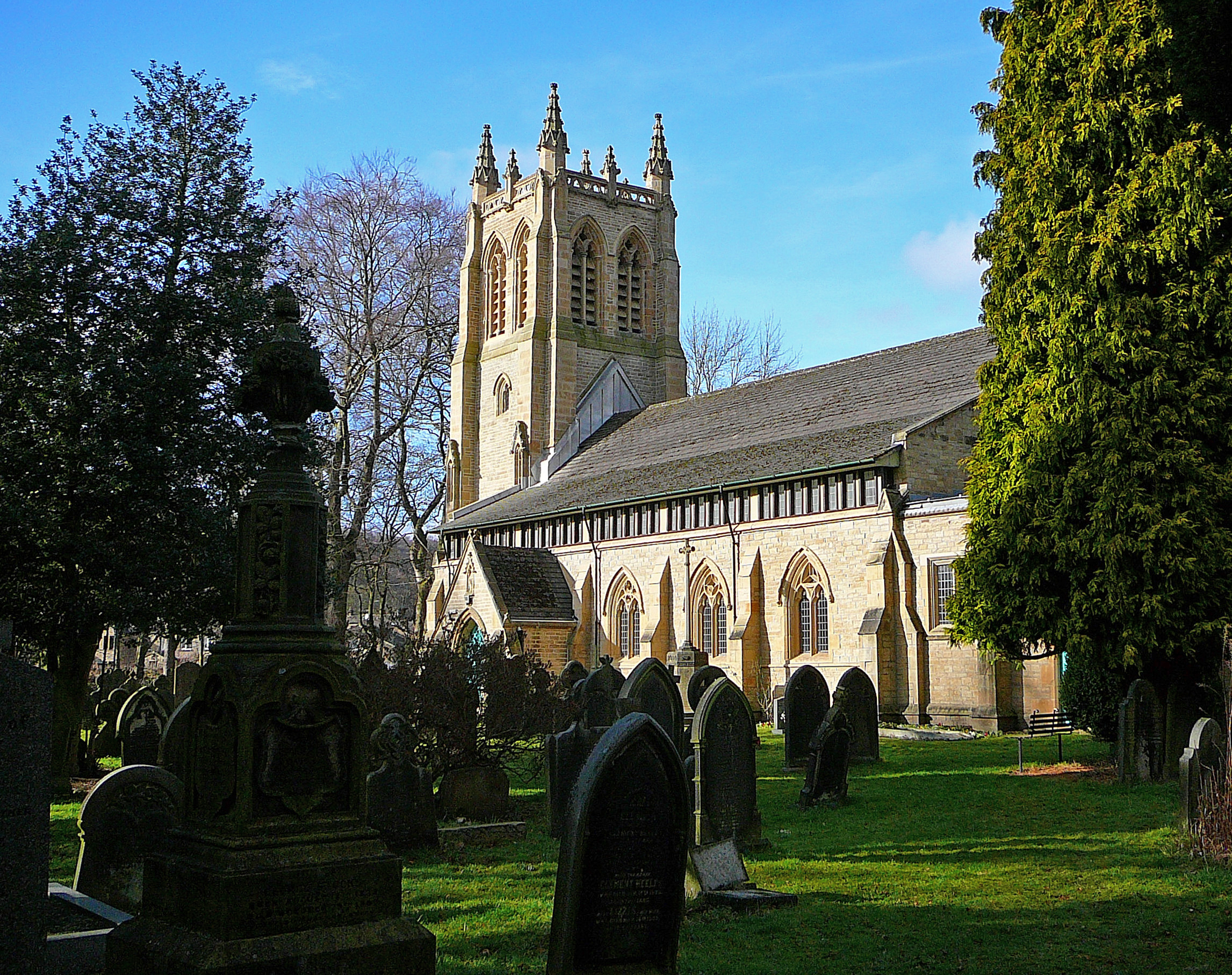 near Huddersfield